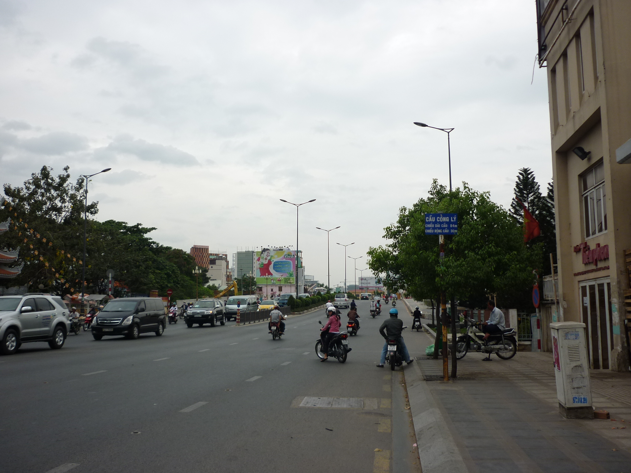 Đầu cầu Công Lý phía quận 3